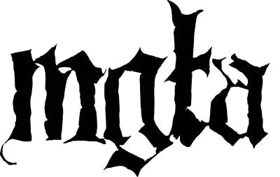 Logo von Mgła